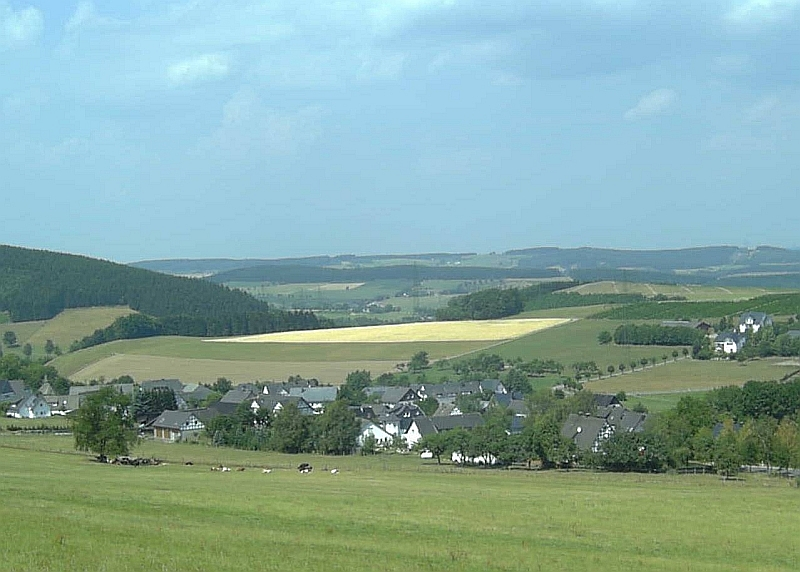 Werpe (Schmallenberg), Germany.